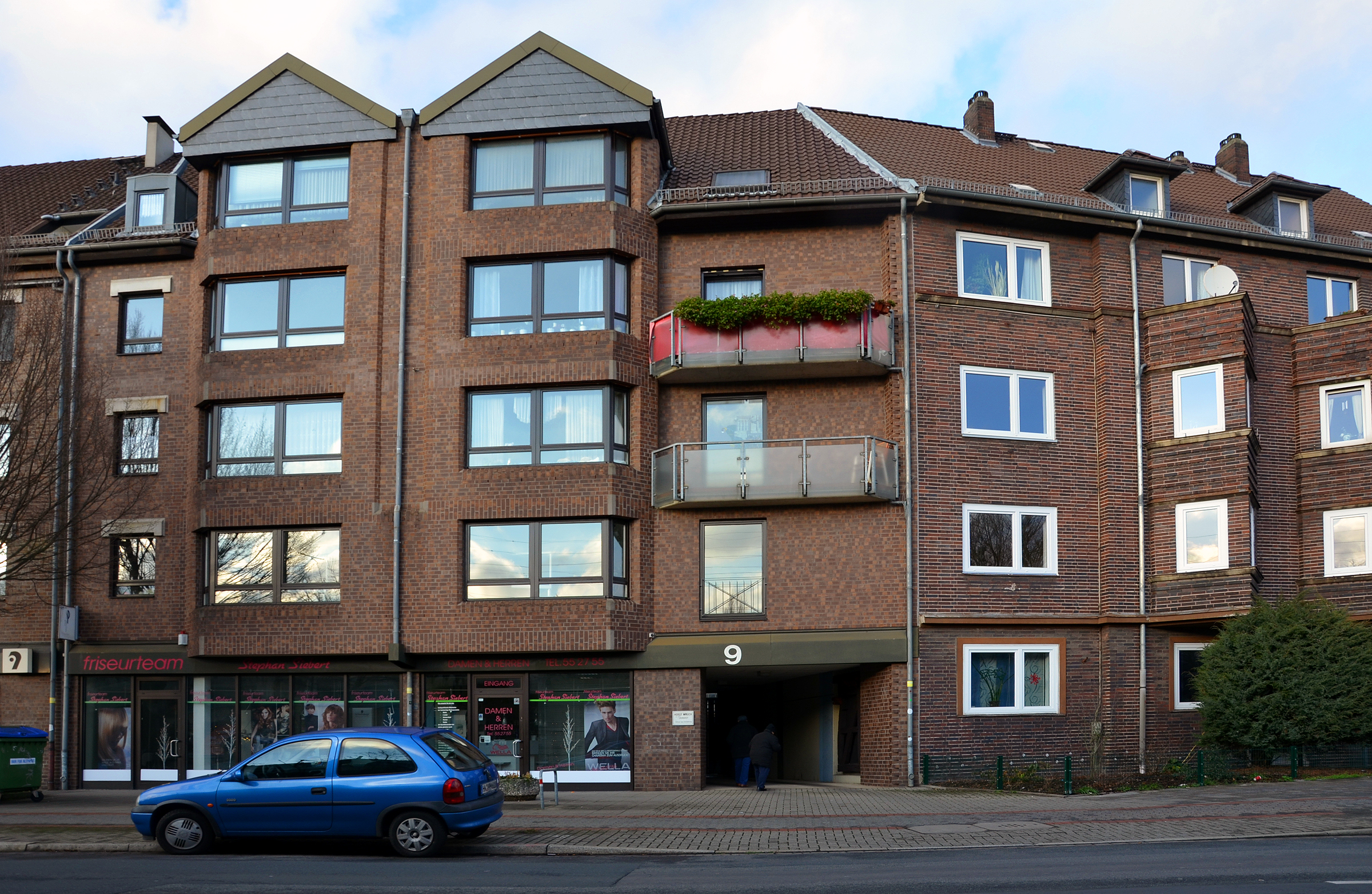 Das Wohn- und Geschäftsgebäude Berckhusenstraße 9 (früher: Scheidestraße20) in Hannover-Kleefeld wurde errichtet an Stelle des beim letzten Luftangriff auf Hannover im Zweiten Weltkrieg am 28. März 1945 zerstörten Hauses des Drehorgel- und Orchestrionbauers Fritz Wrede ...